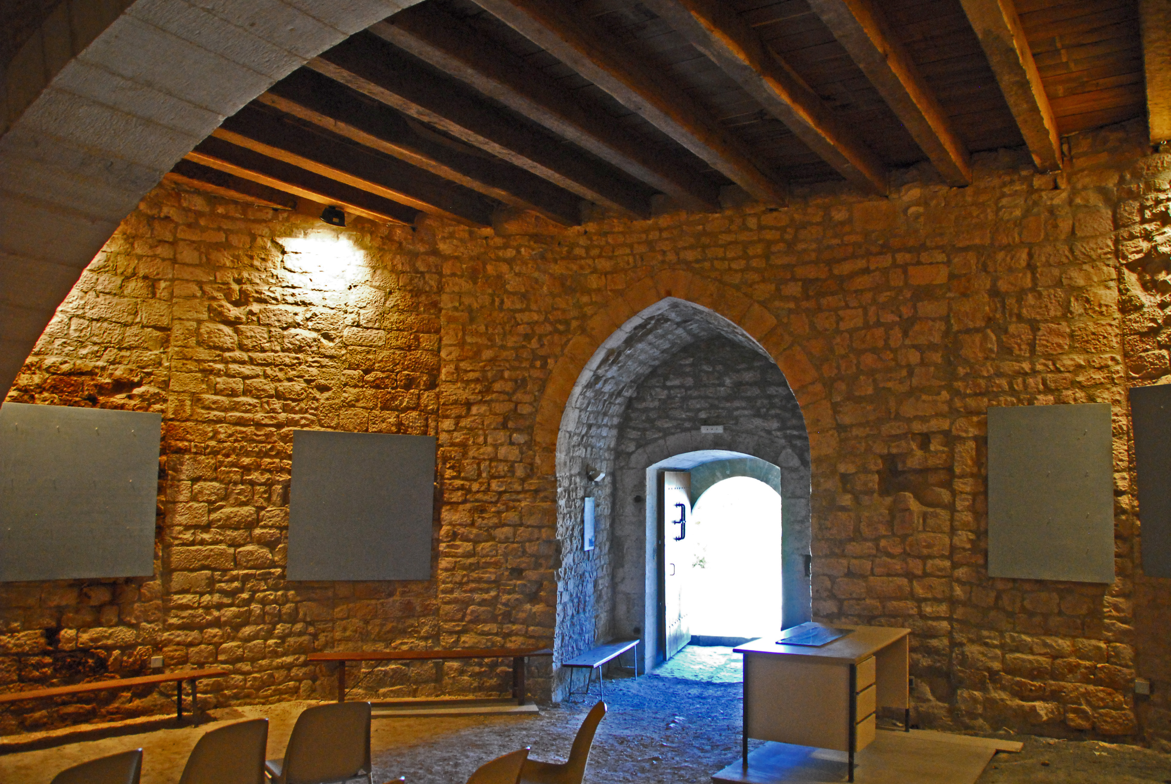 Chateau de Simiane-la-Rotonde, Erdgedchoss der Rotunde, Portalseite